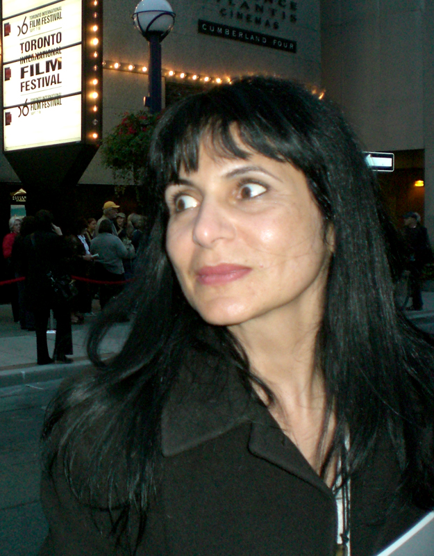 Produtora e roteirista Rita Buzzar Producer and screenwriter Rita Buzzar